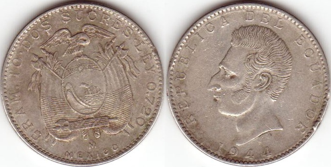 Ecuadorian 2 Sucres coin